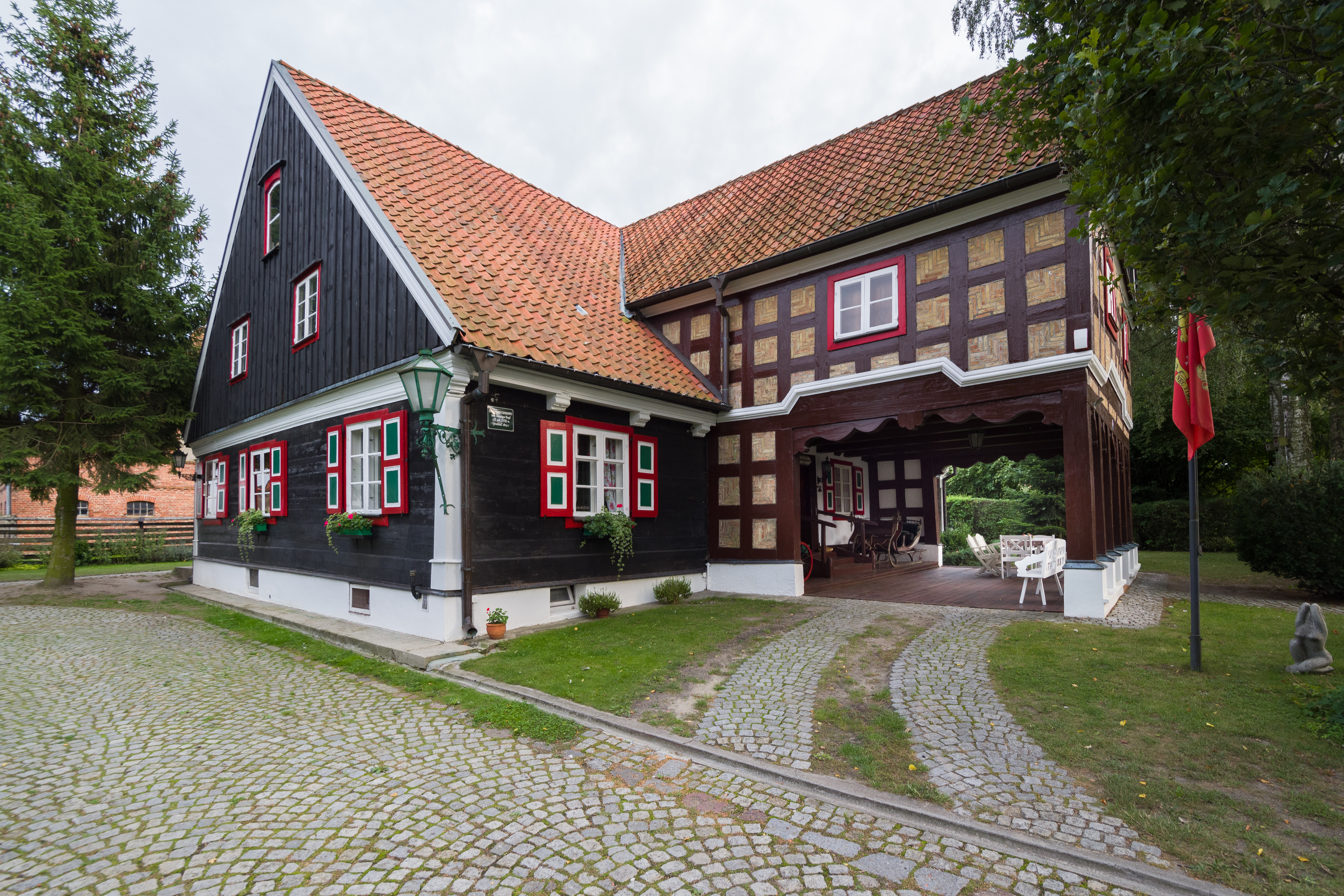 Dom podcieniowy nr 6 w Żuławakch